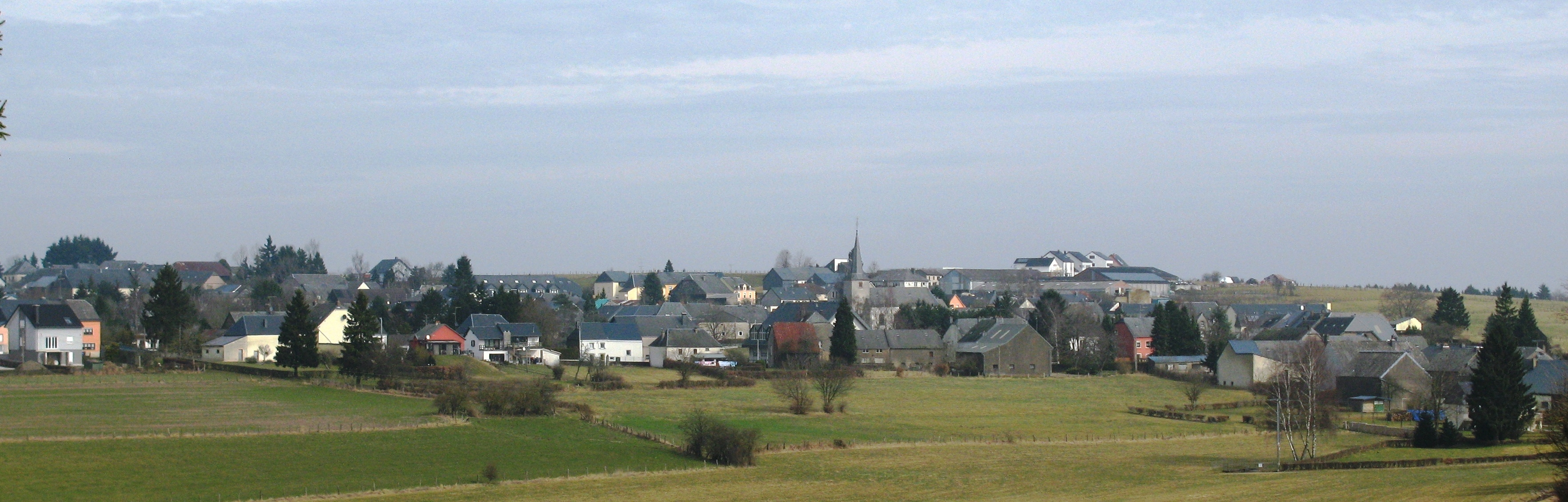 Bungeref